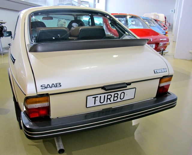 Saab 99 på Saab Car Museum i Trollhättan